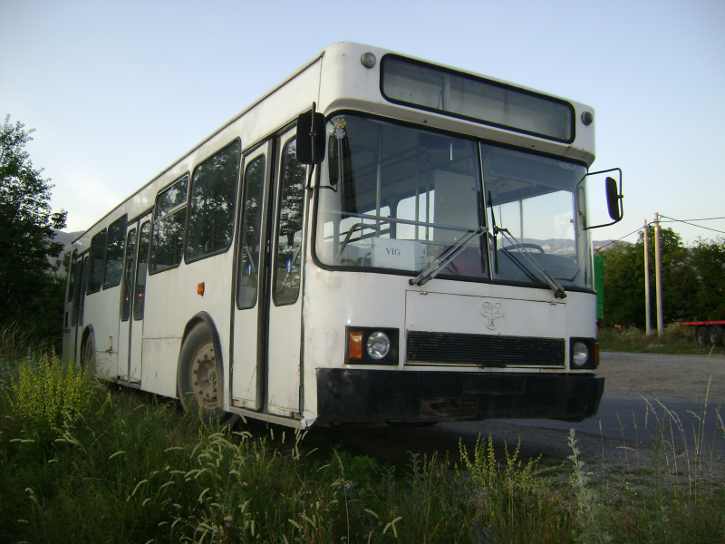 Bivši autobus "Autotroleja" #510 Marke TAM 260 A 116 M